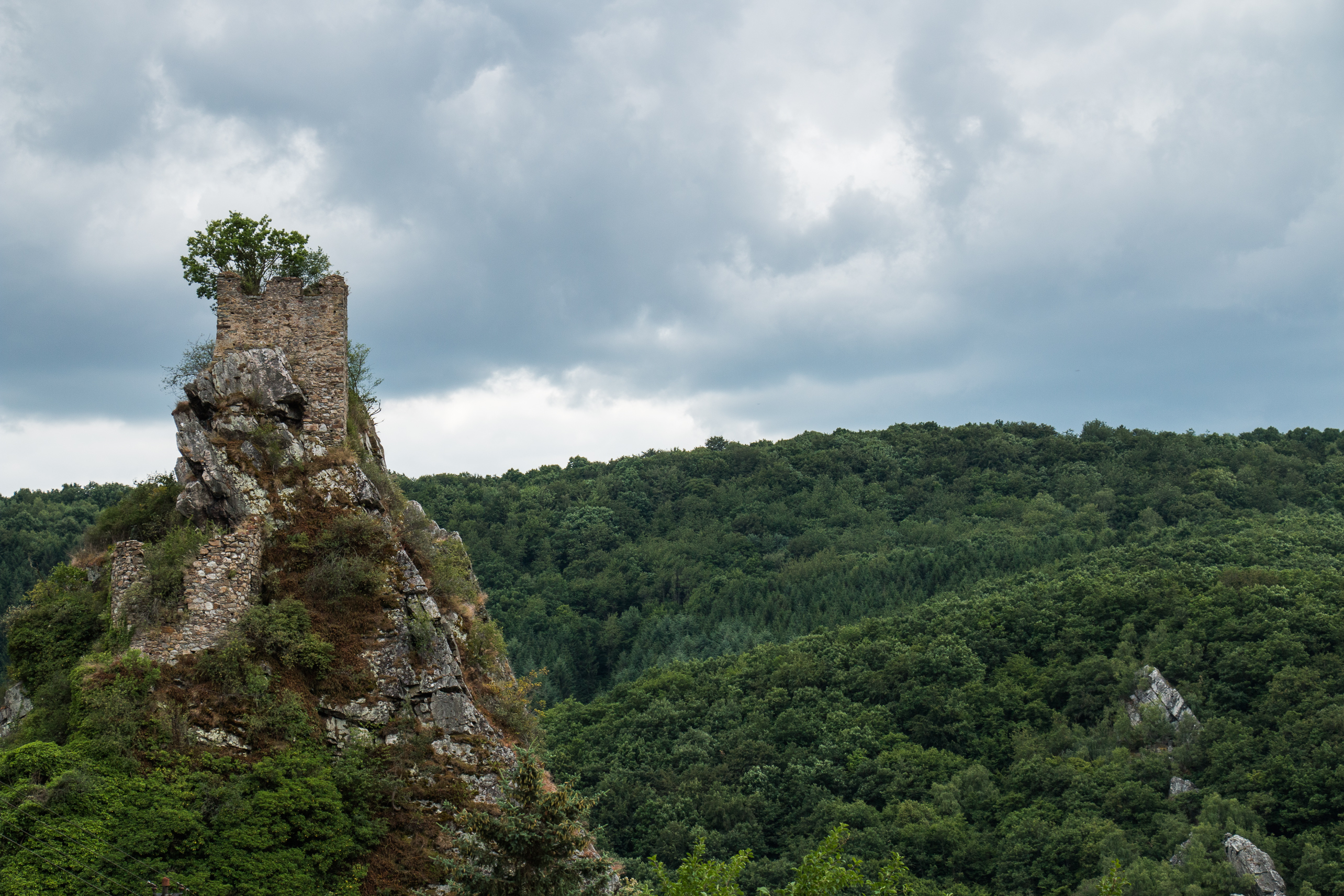 Der Kallenfels mit dem Bergfried der Burgruine Steinkallenfells auf einem Felssporn des Soonwalds bei Kirn